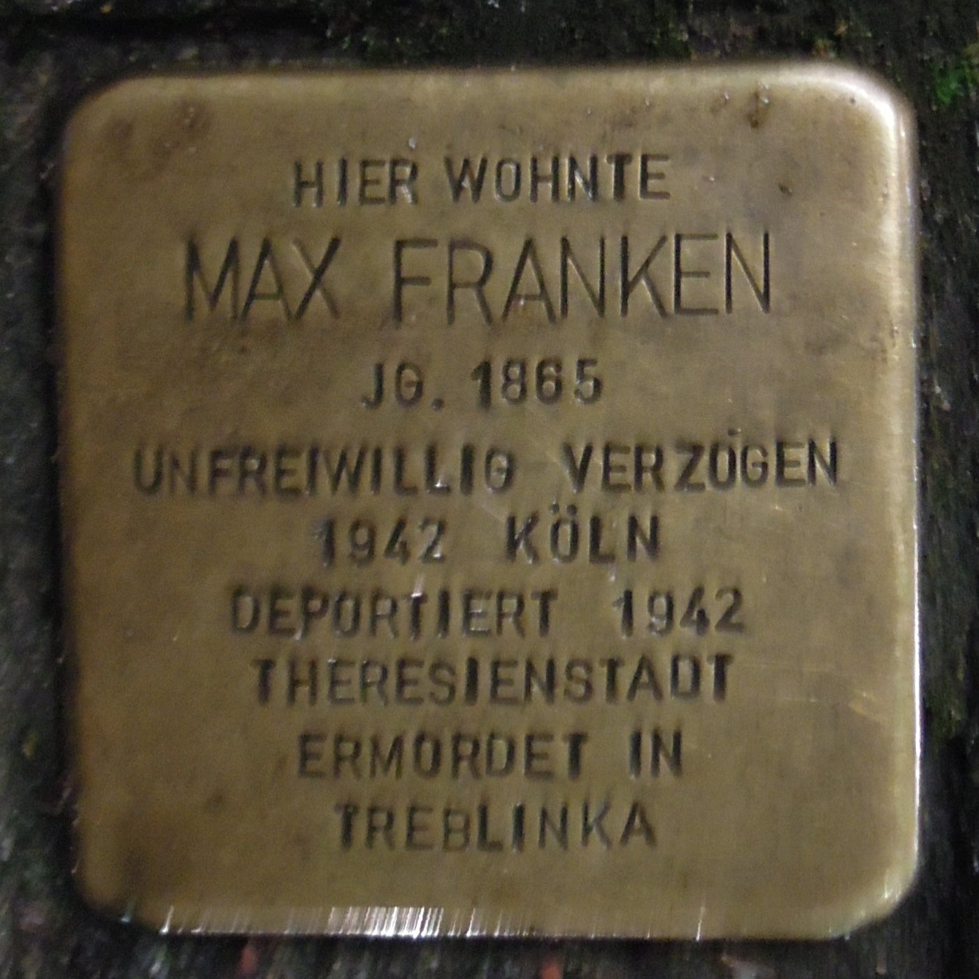 Stolperstein Geldern Bahnhofstraße 9 Max Franken